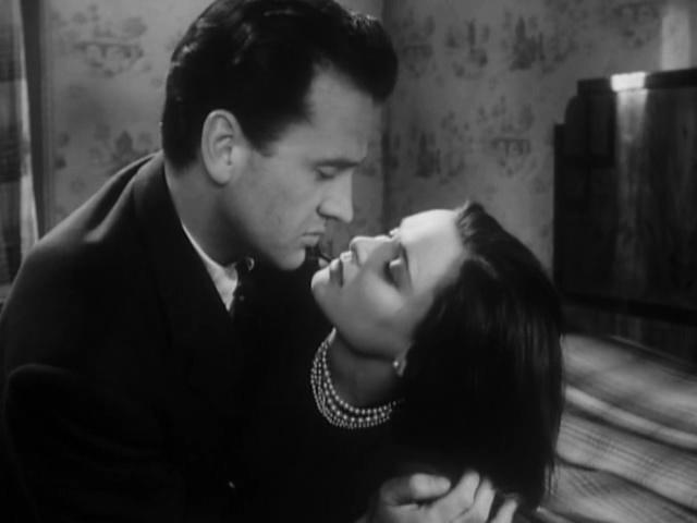 Massimo Girotti et Lucia Bosé dans Cronaca di un amore (1950) réalisé par Michelangelo Antonioni